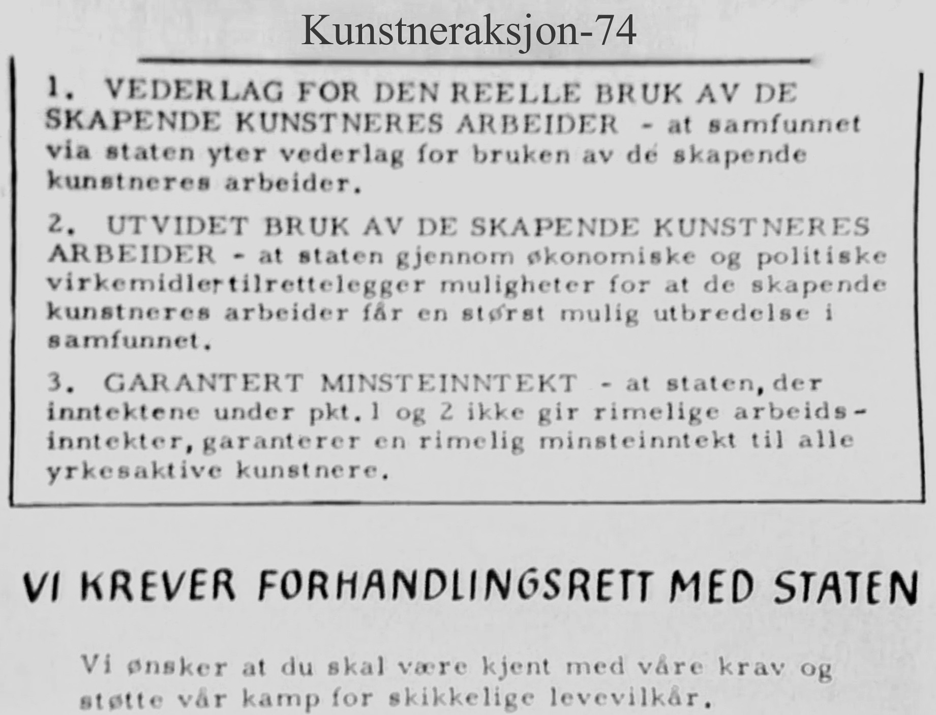 Kunstneraksjon-74 sine krav til staten